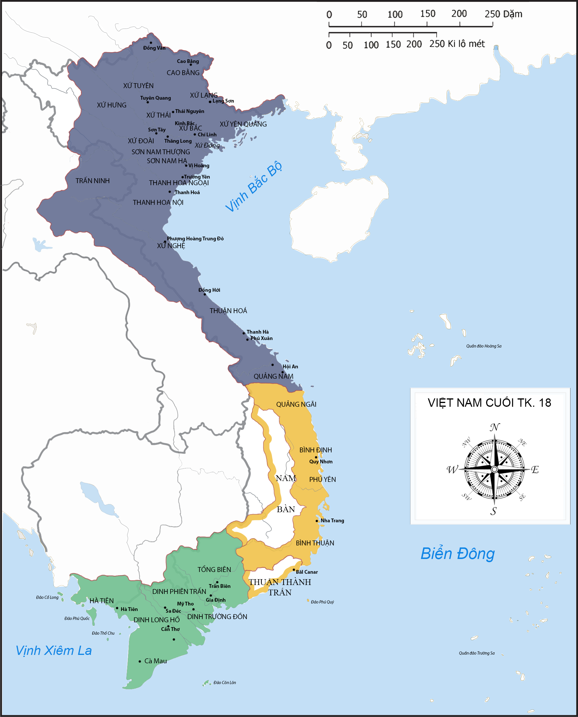 Tình hình Việt Nam những năm cuối thế kỷ 18: Lãnh thổ nằm dưới sự quản lý của Nguyễn Huệ Lãnh thổ nằm dưới sự quản lý của Nguyễn Nhạc Lãnh thổ nằm dưới sự kiểm soát của Nguyễn Ánh Dựa theo bản đồ của Trần Trọng Kim